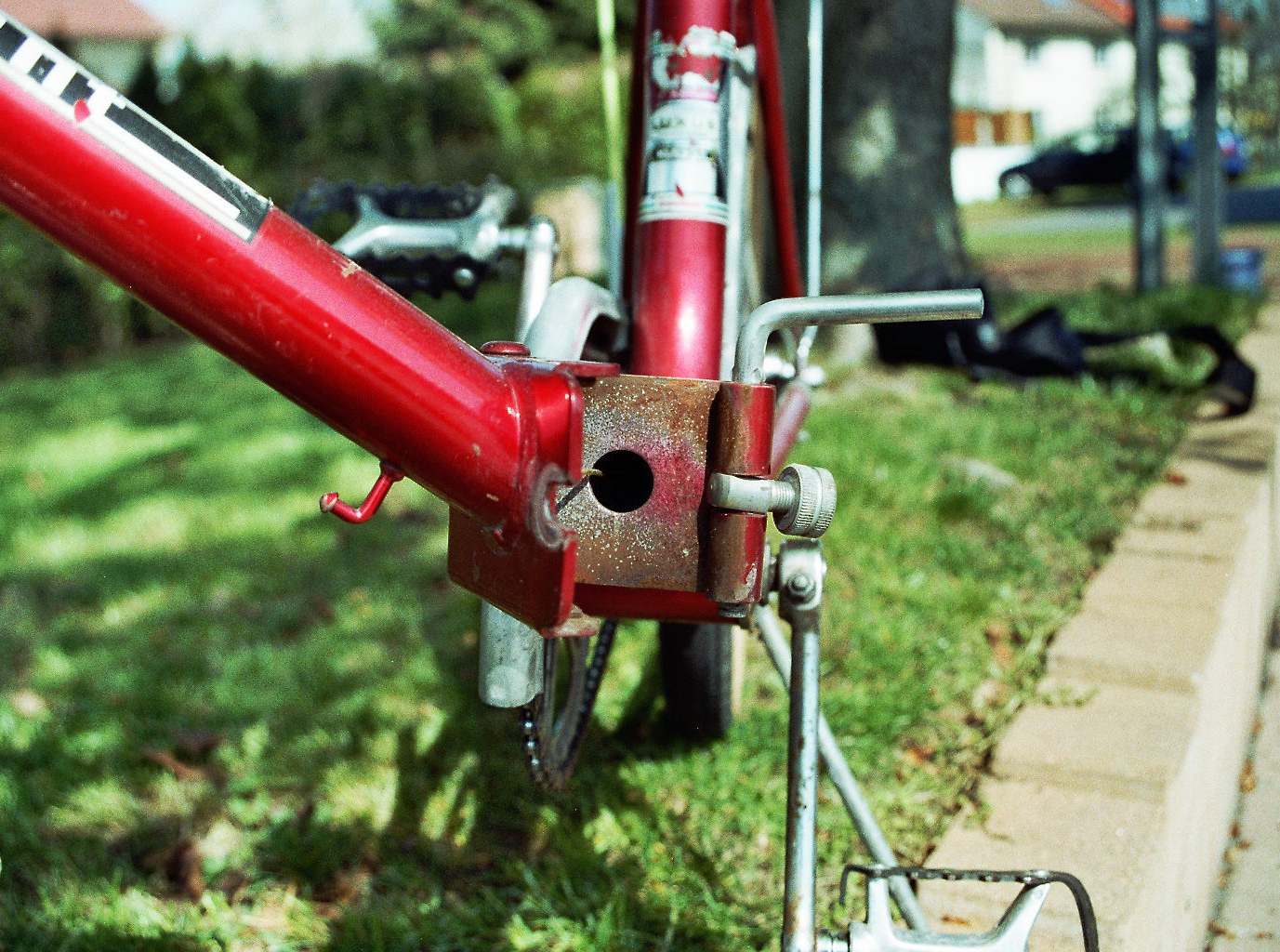 Scharnier eines Klapp- bzw. Faltrades